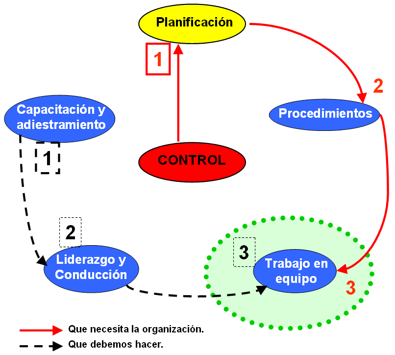 La intersección de ambos caminos marcan al trabajo en equipo como un pilar fundamental. del sistema.